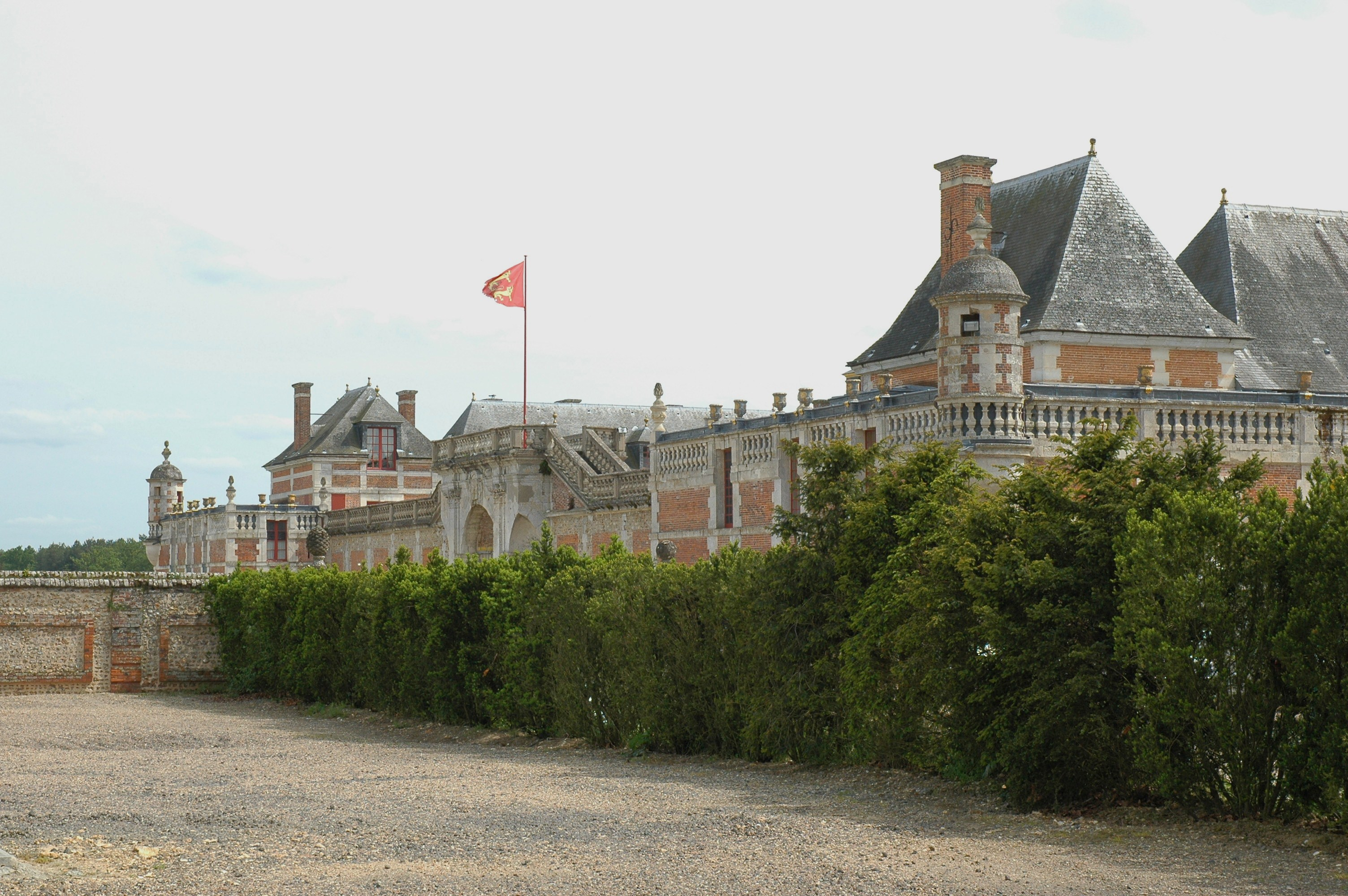 Nordost-Seite des Schlosses Le Champ de Bataille